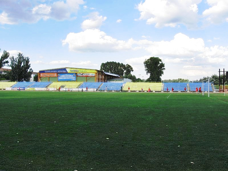 Stadionul 1 mai (Slobozia)